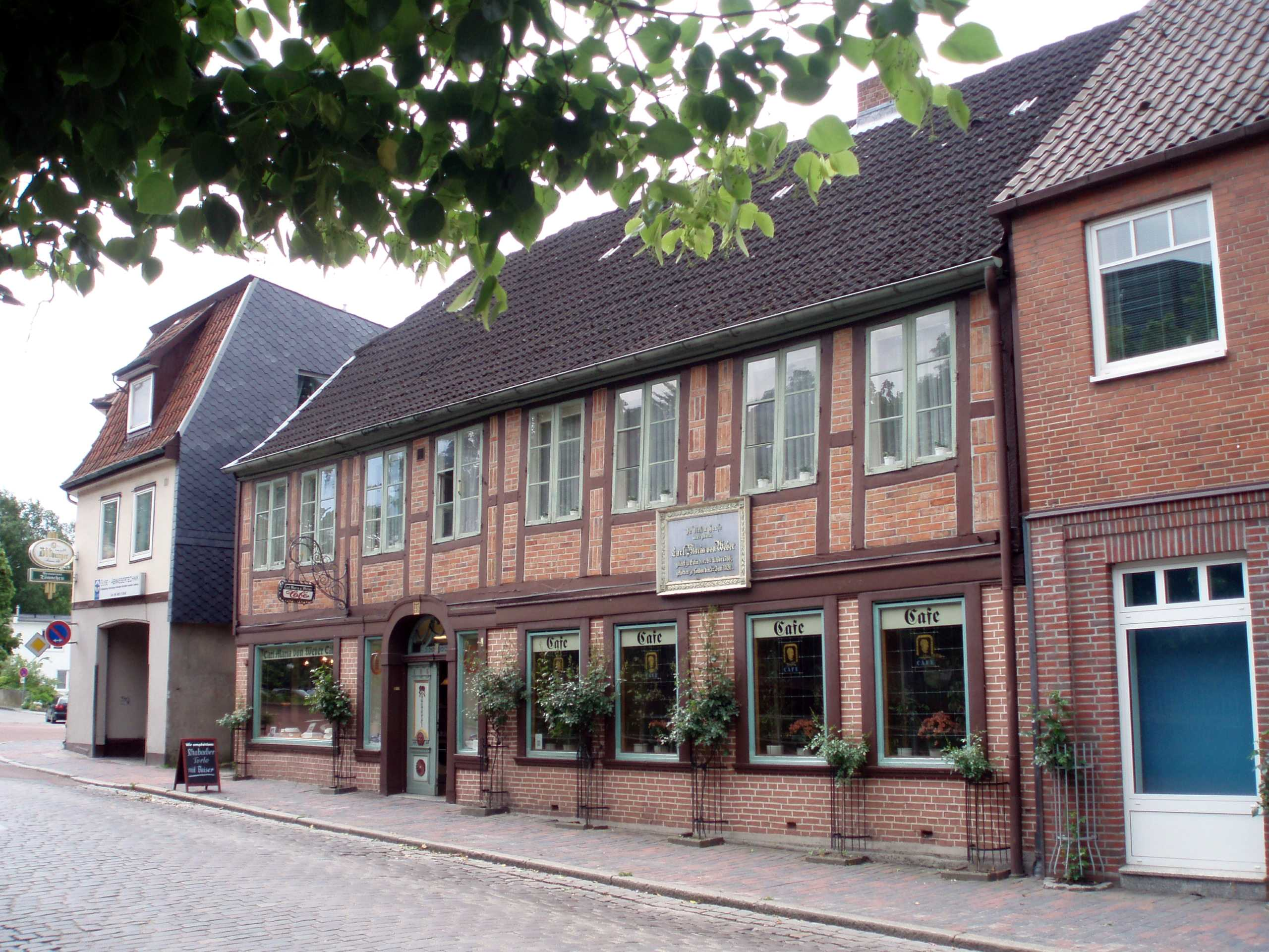 Weberhaus in Eutin